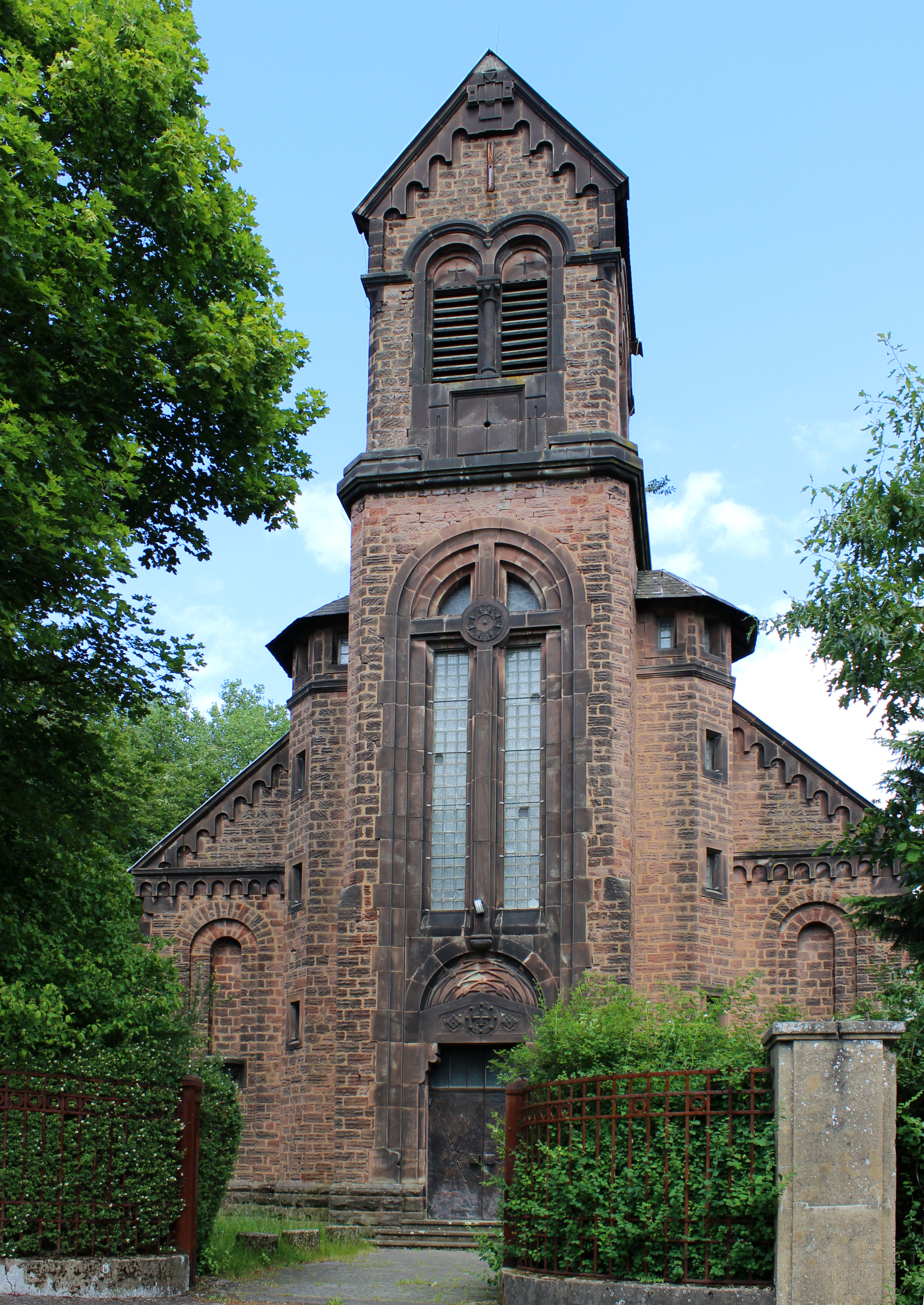 Kath. Kirche St. Ludwig, Maybach, Stadt Friedrichsthal, Saarland